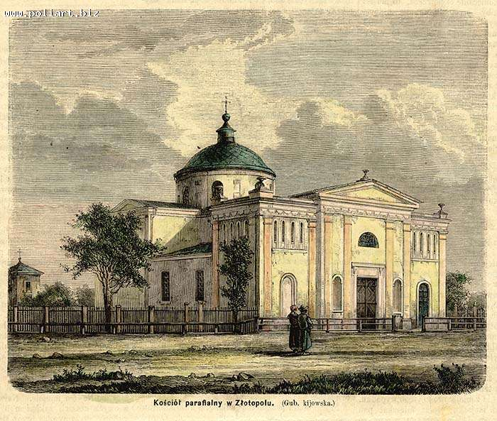 Kościół parafialny w Złotopolu.: Wycinek. Kościół poświęcony 1817 (erekcja 1807), gruntownie przebudowany 1861, zob. ww. tekst i SGKP t.14 s.643. Dawny powiat czehryński.